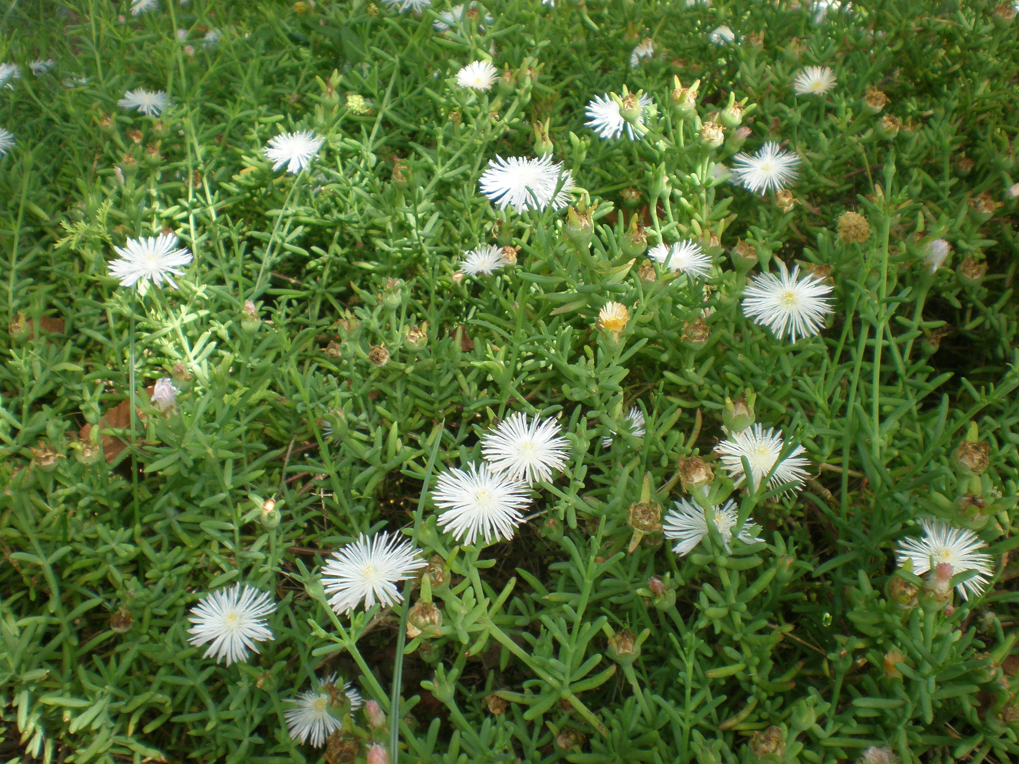 Jardín Botánico de Barcelona.